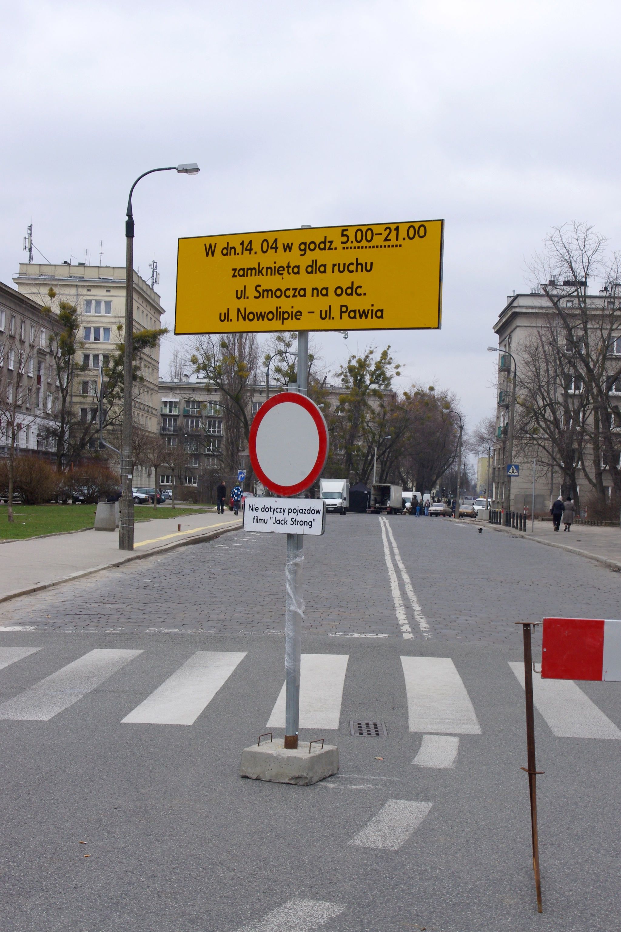 Ulica Smocza w Warszawie podczas kręcenia filmu Władysława Pasikowskiego – „Jack Strong” (14.04.2013)